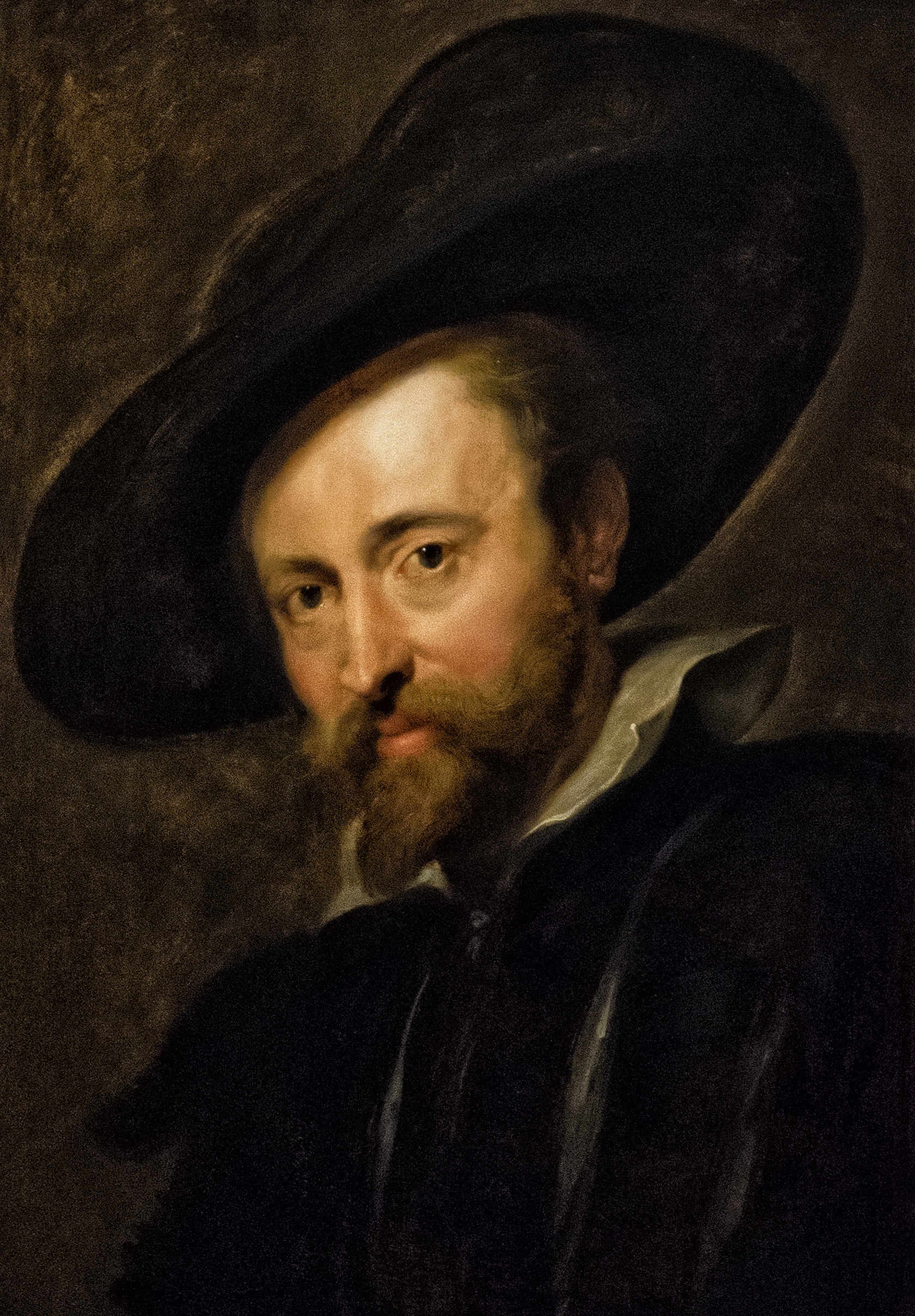 Peter Paul Rubens (1577-1640) - Zelfportret - Rubenshuis Antwerpen